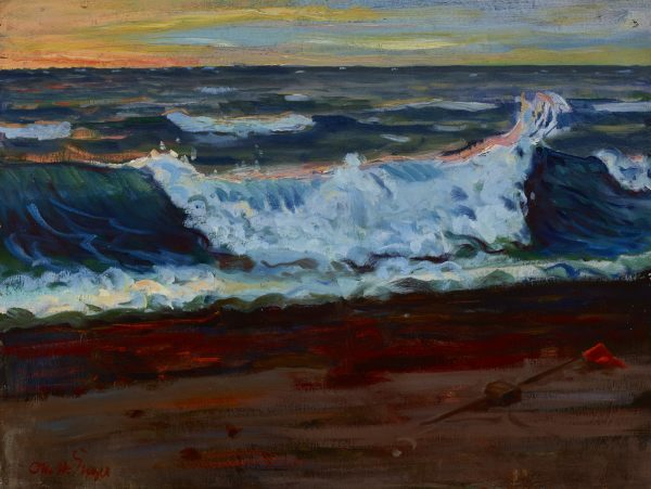 Die Woge